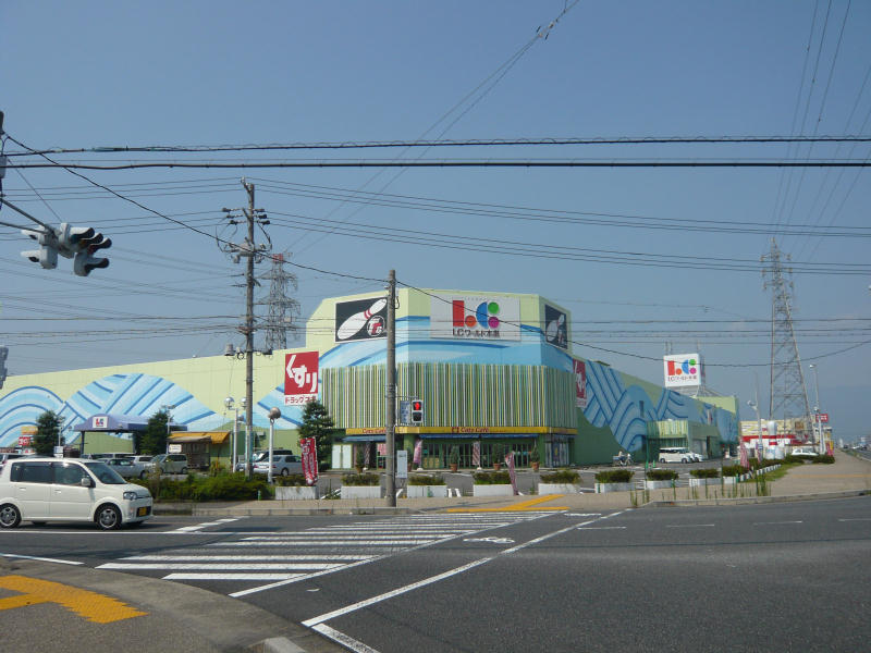 LCワールド